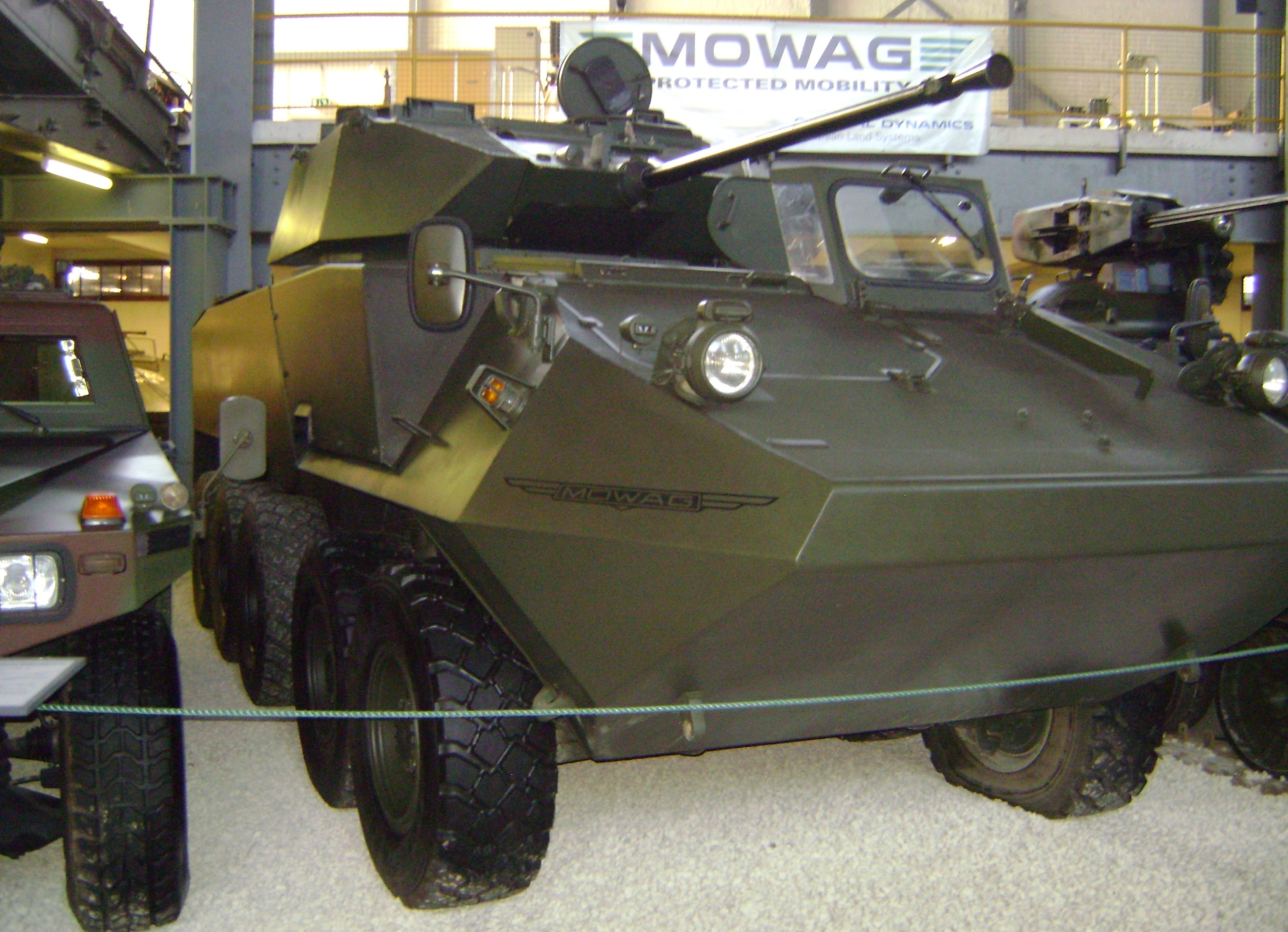 MOWAG PIRANHA 10x10 front